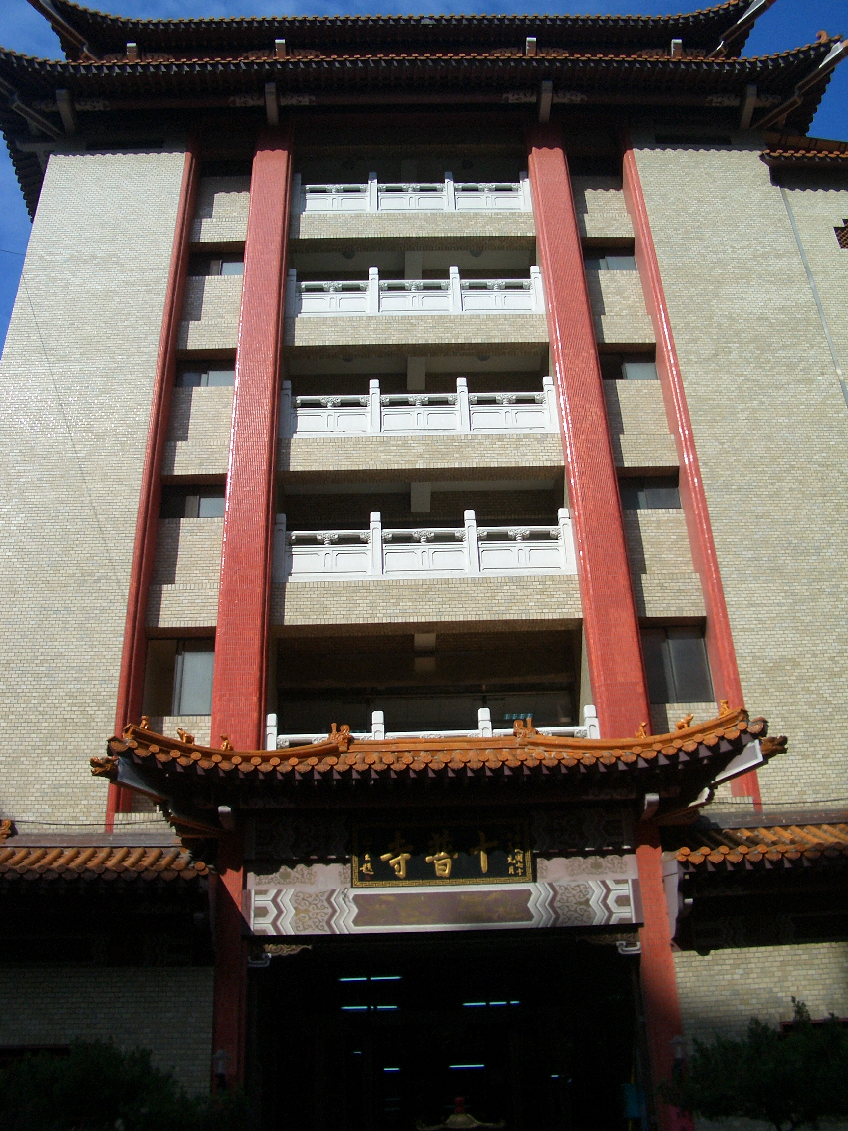 中華民國台灣台北市佛教寺廟 十普寺